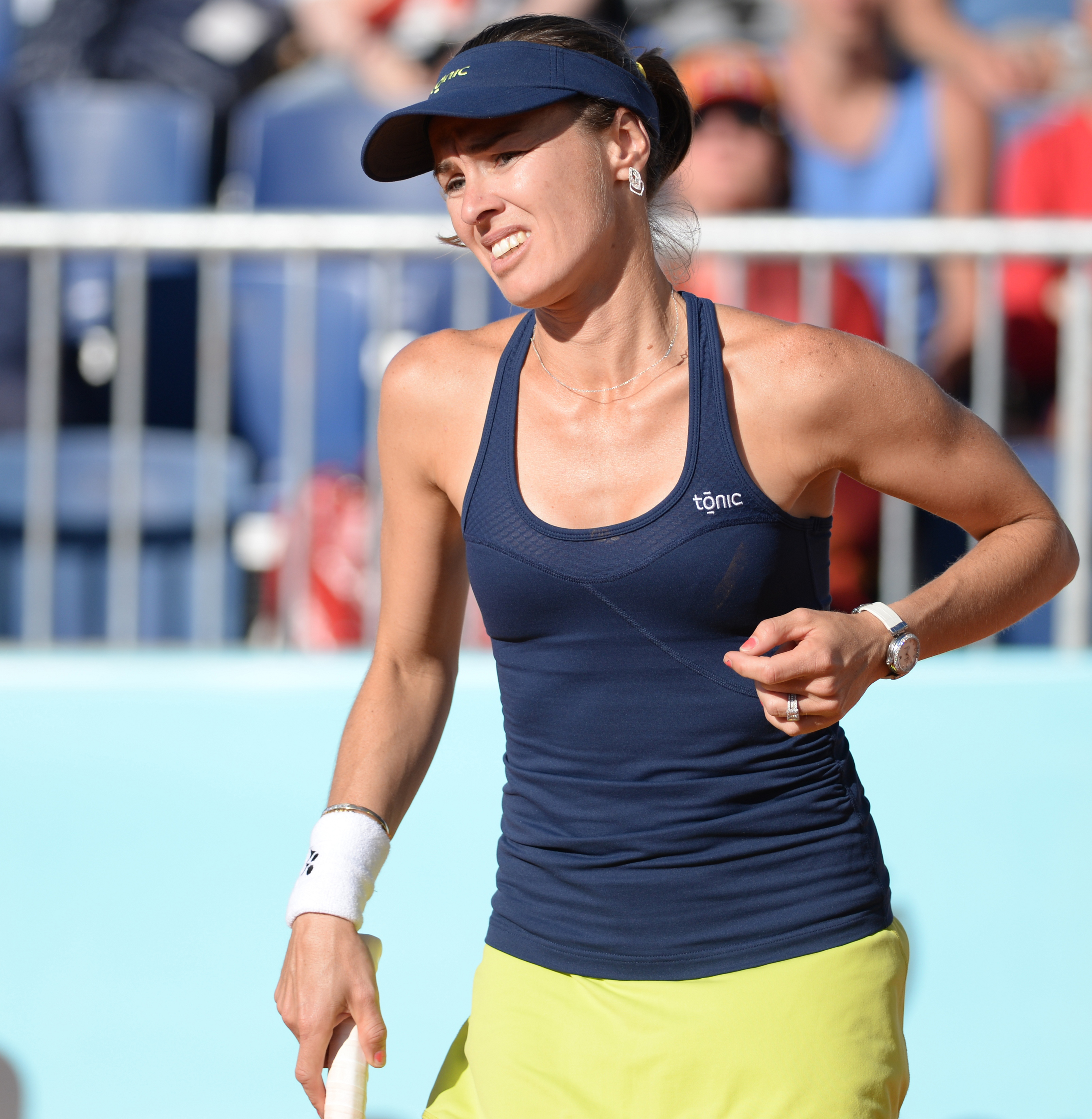 Martina Hingis